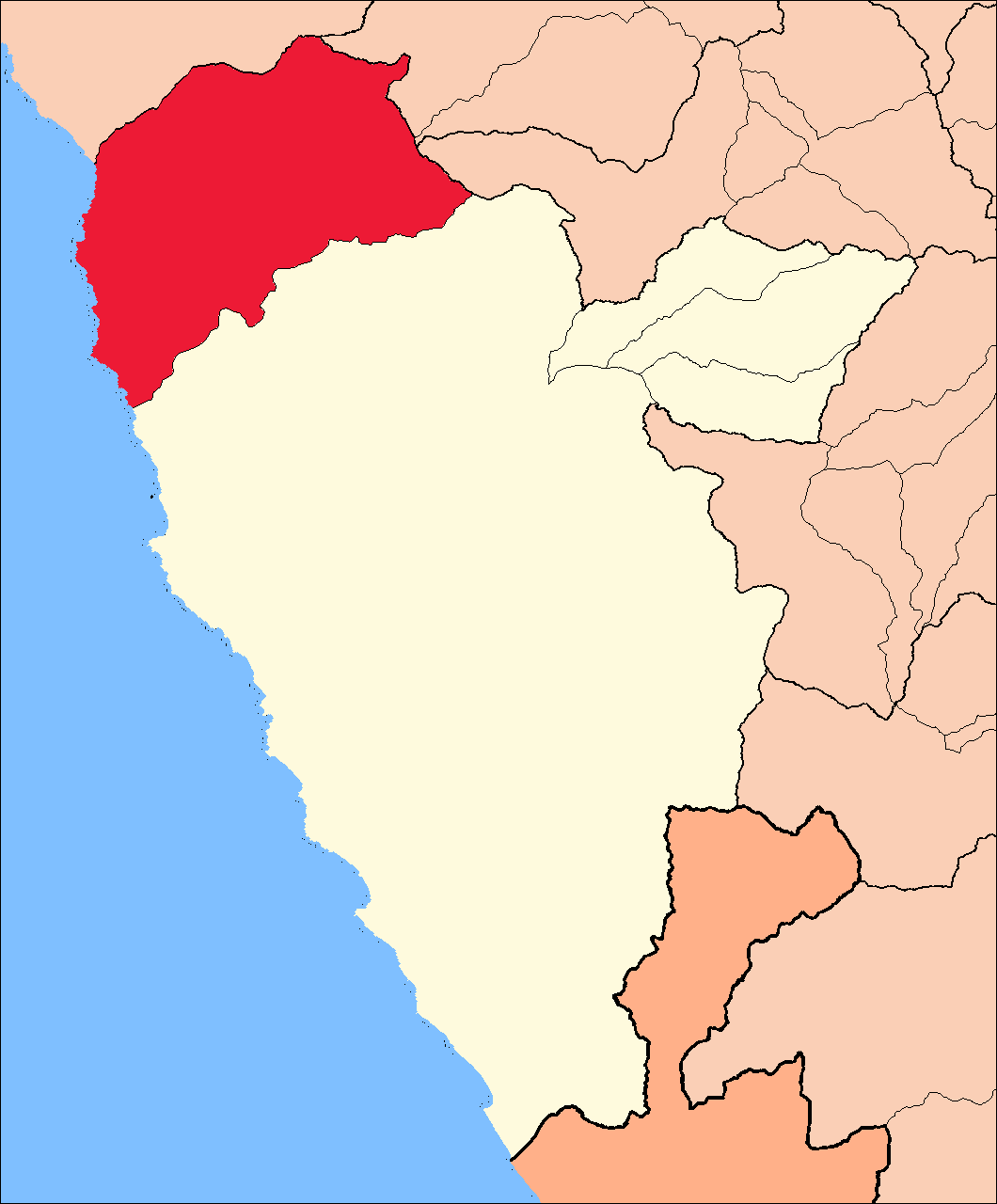 Ubicación del área del distrito de Culebras.